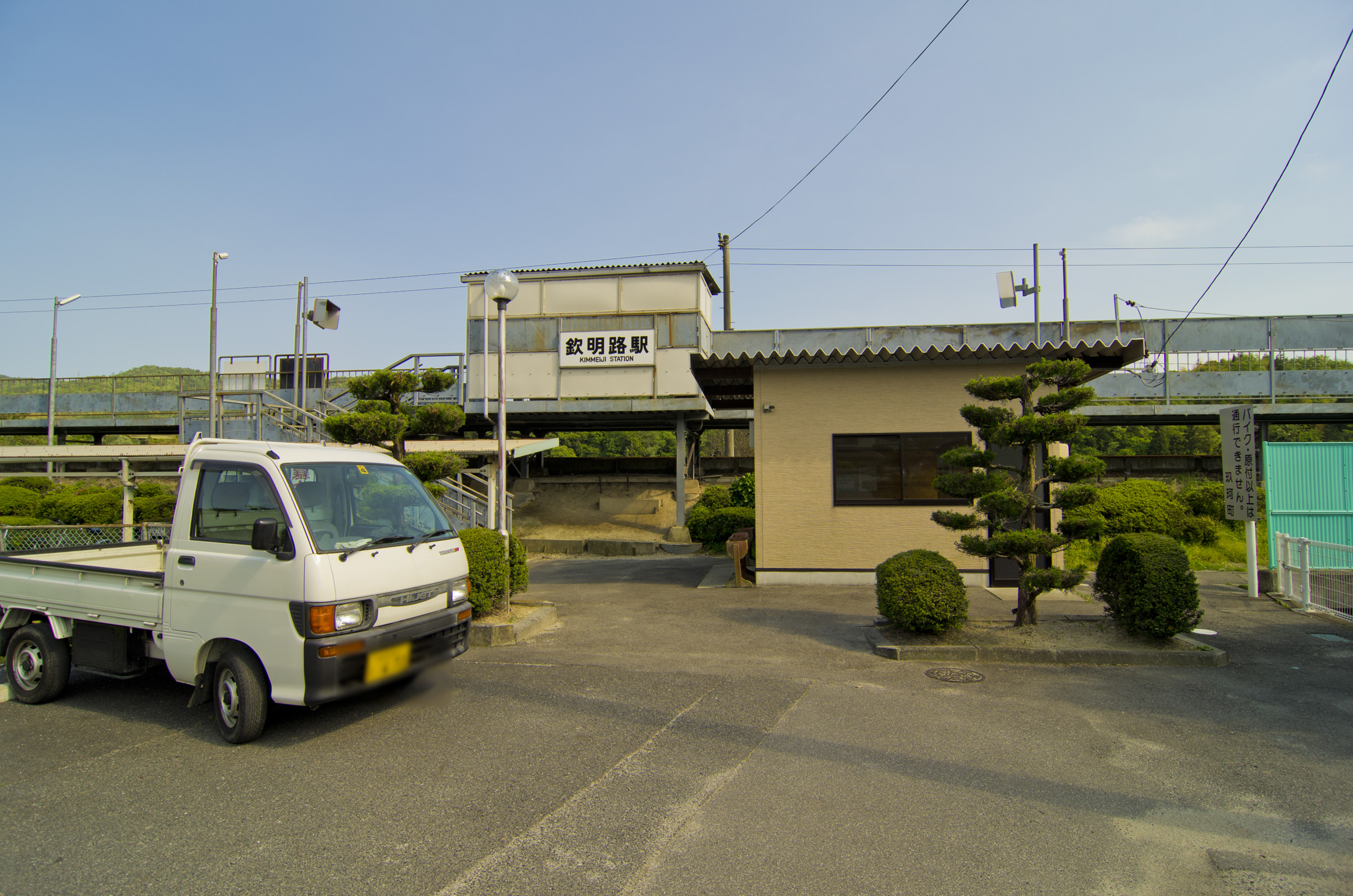 西日本旅客鉄道株式会社岩徳線欽明路駅